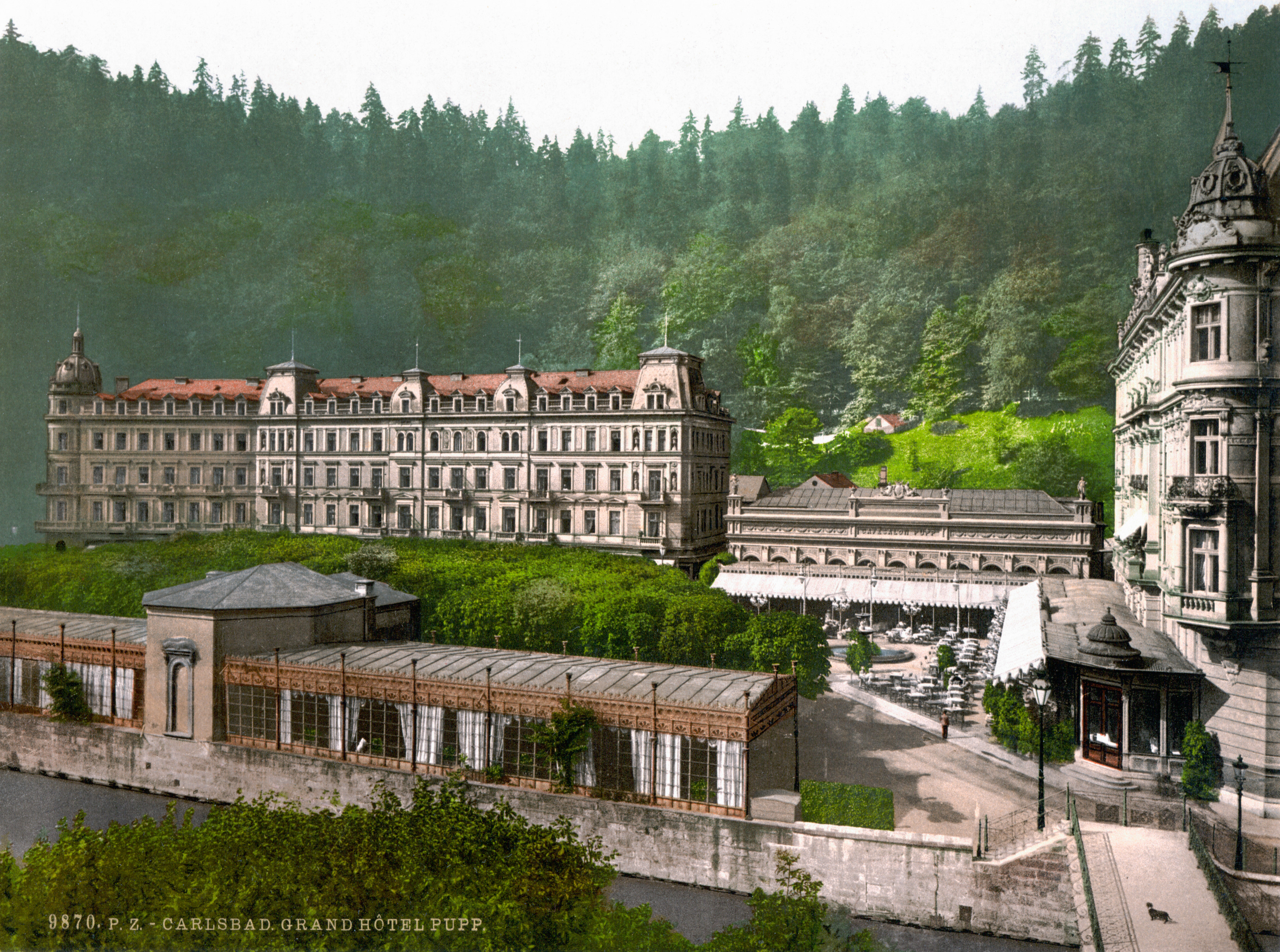 Grandhotel Pupp kolem roku 1900.